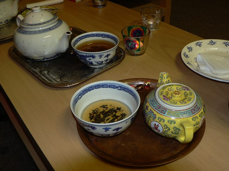 Ženšenový čaj a uzený Lapsang souchong servírované v pražské čajovně Shangri La.